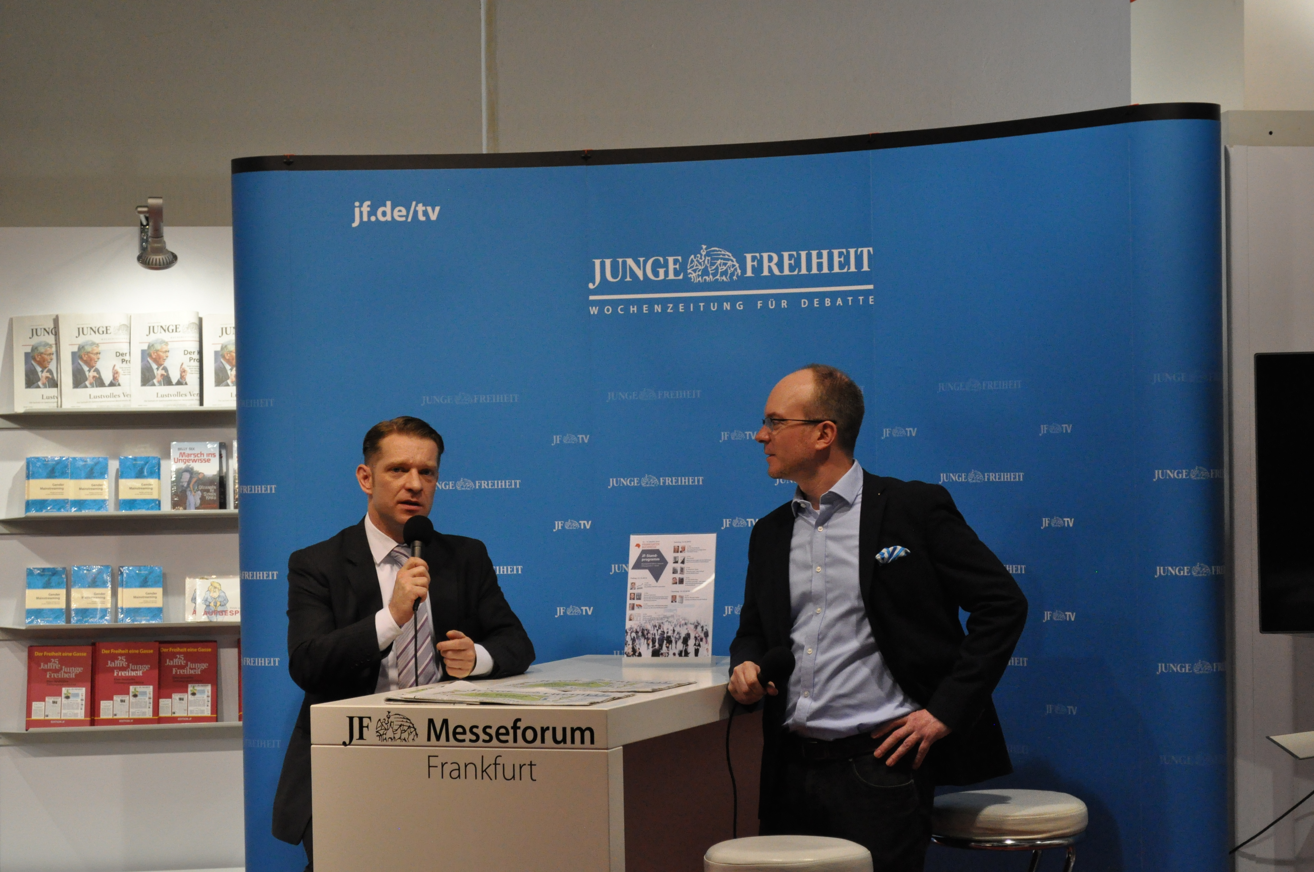 Norman Gutschow Bibliothek des Konservatismus Junge Freiheit Frankfurter Buchmesse 2018